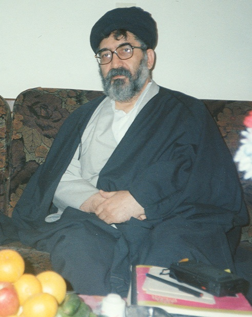 هادي خسروشاهي سفير إيران في مصر